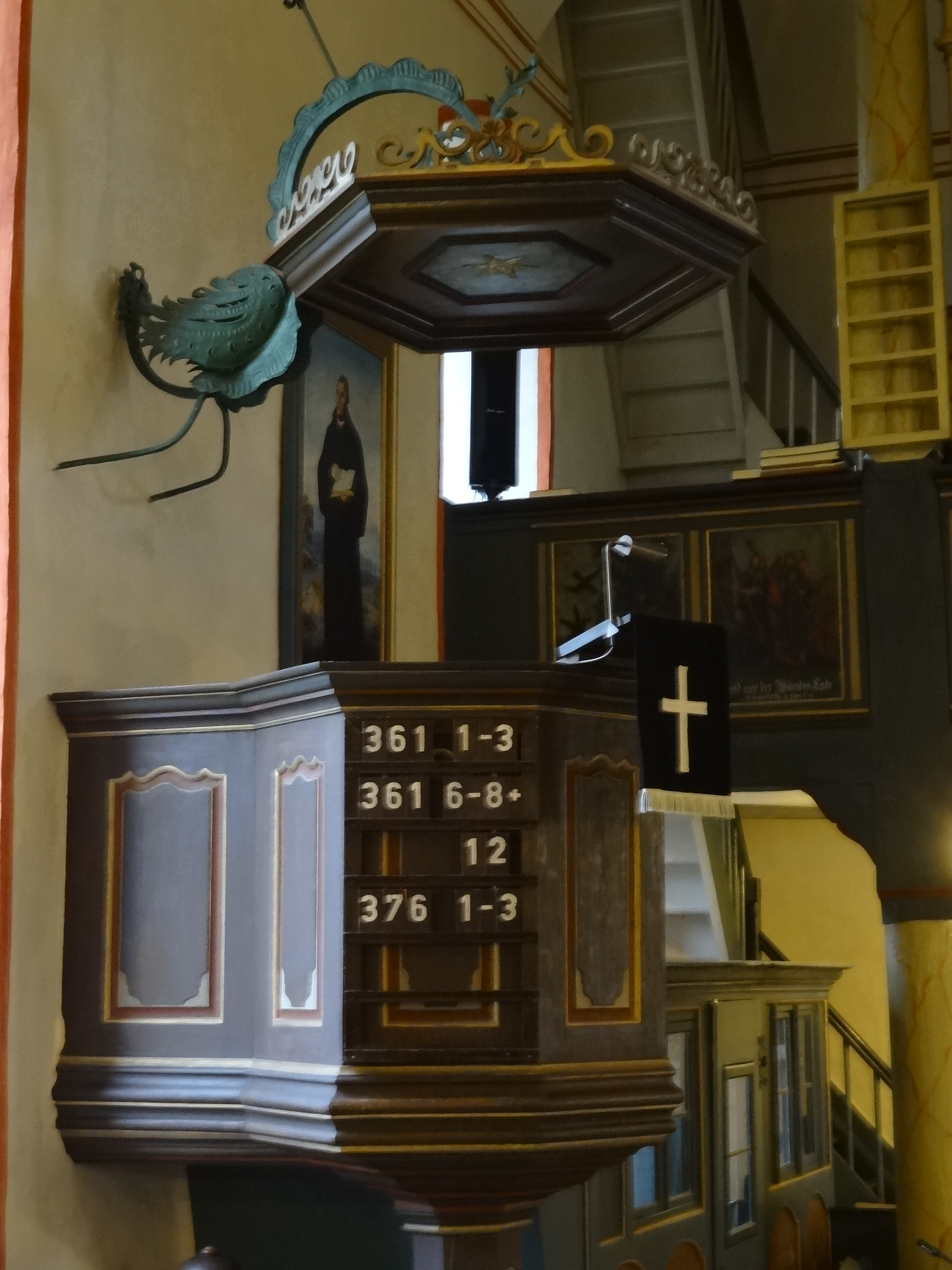 Evangelische Kirche Albach